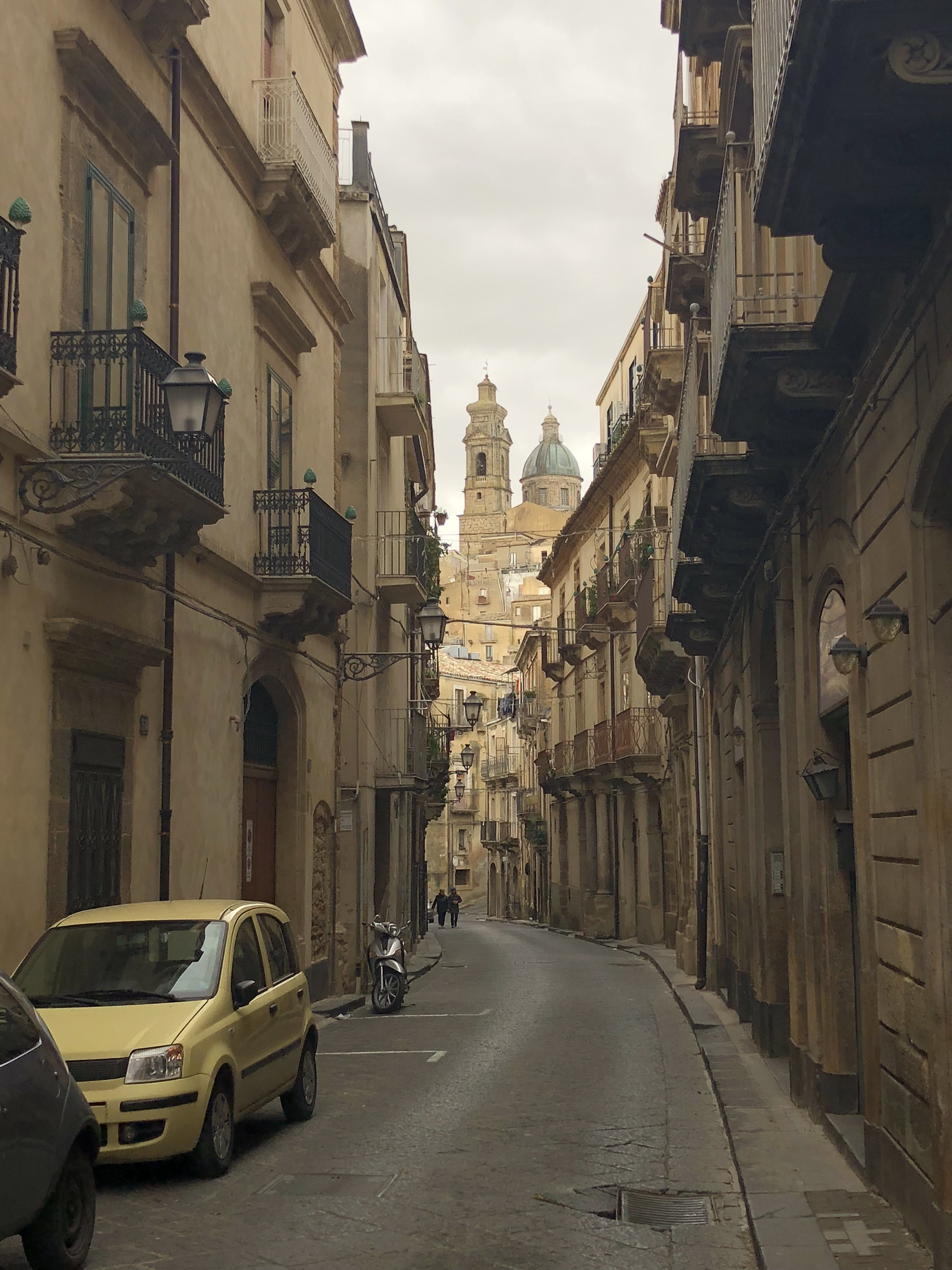 via Luigi Sturzo